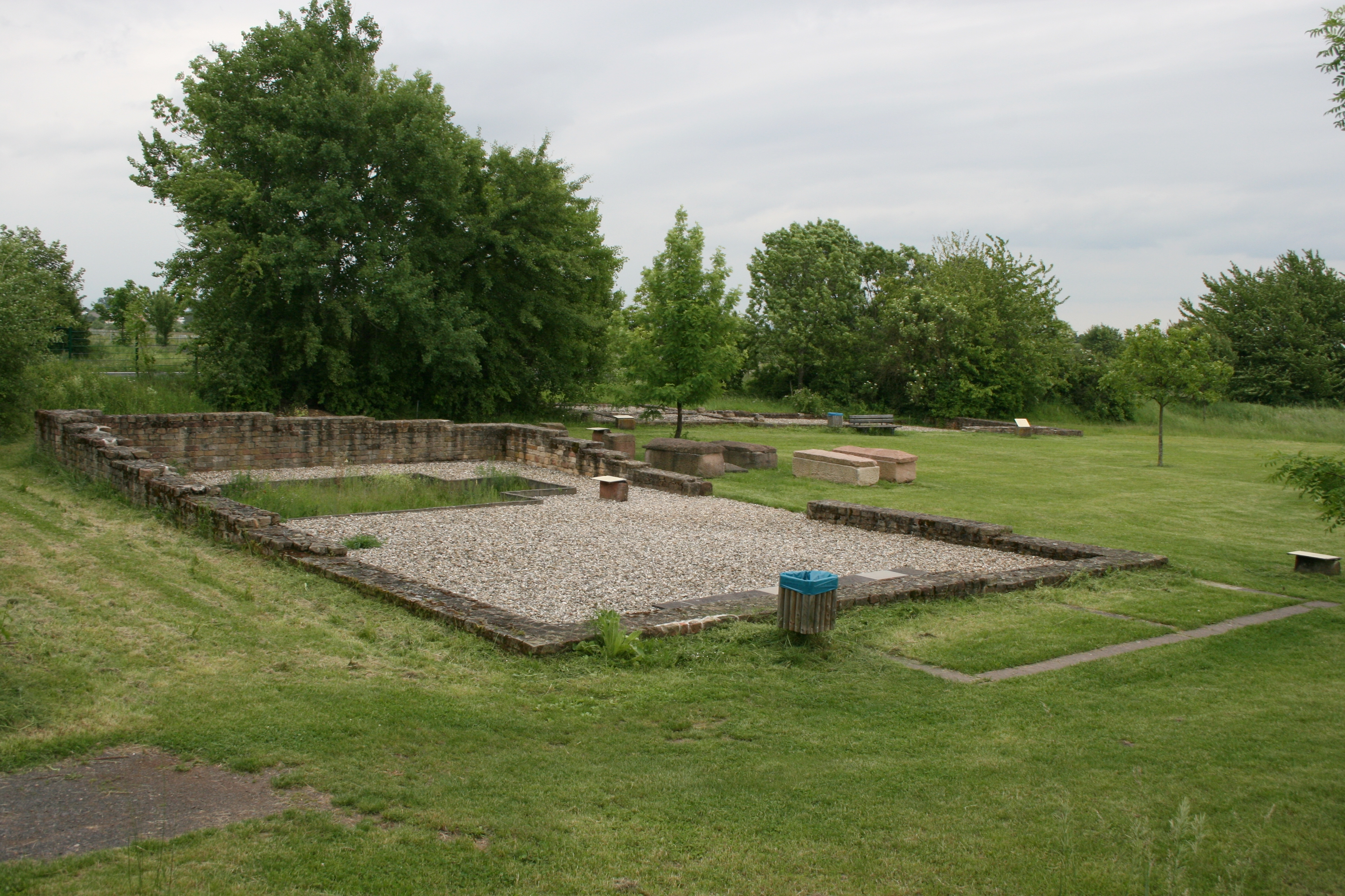 Römische Villa Wachenheim, Ansicht zweier Nebengebäude von Nordwesten. Im Vordergrund Speichergebäude D (mit Darre links und Räucherofen einer früheren Bauphase), im Hintergrund Stallgebäude B mit Wohntrakt C und Kanalheizung. Dazwischen spätantike Steinsarkophage.